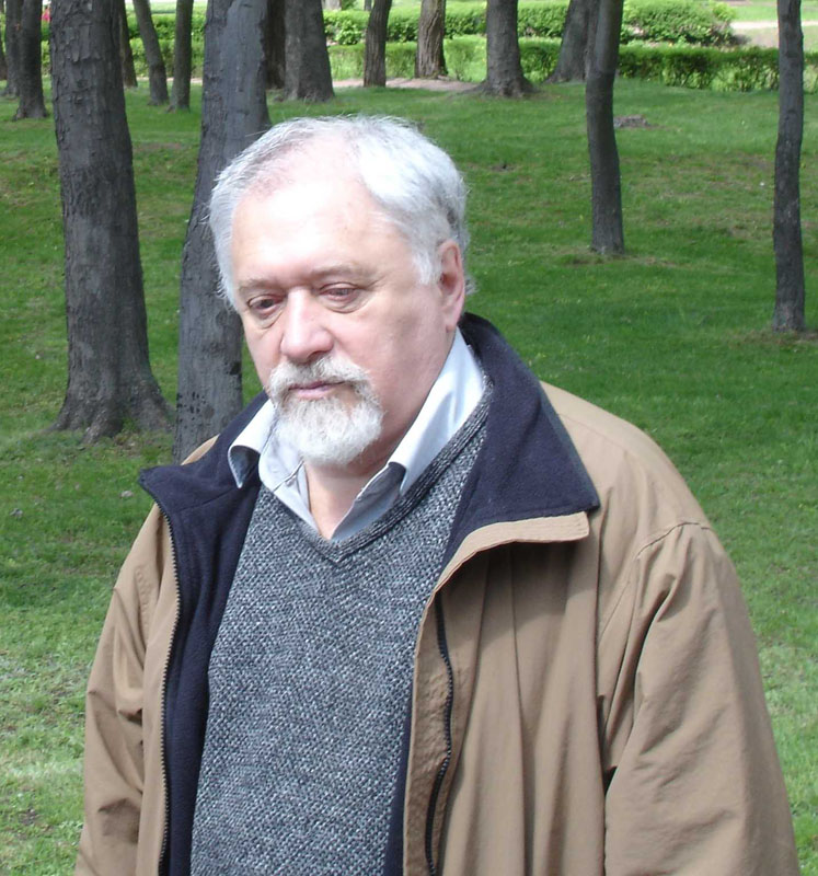 Глузман Семен Фишелевич